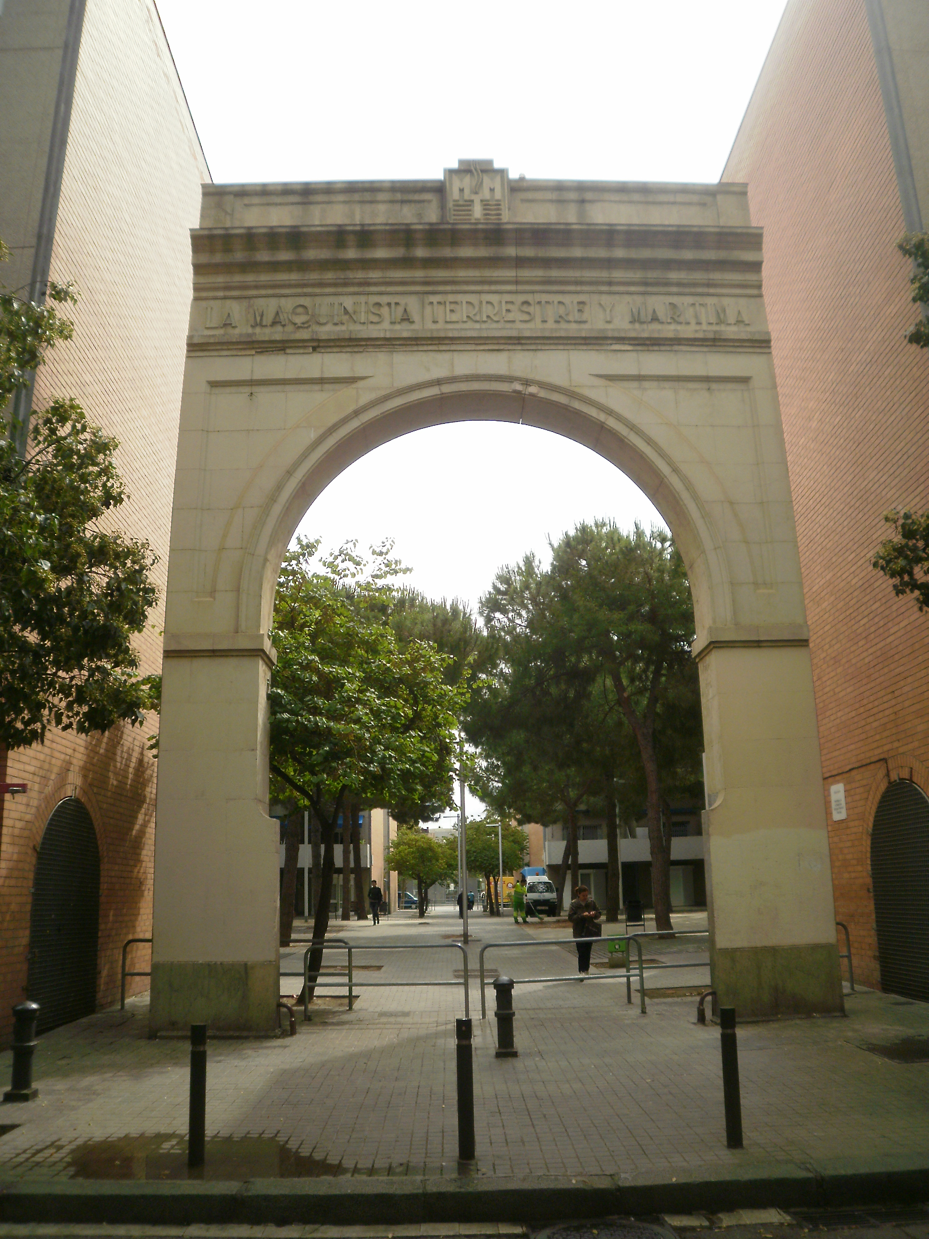 Entrada de La Maquinista Terrestre i Marítima